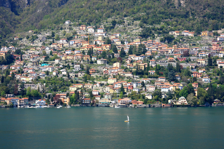 Panorama di Moltrasio